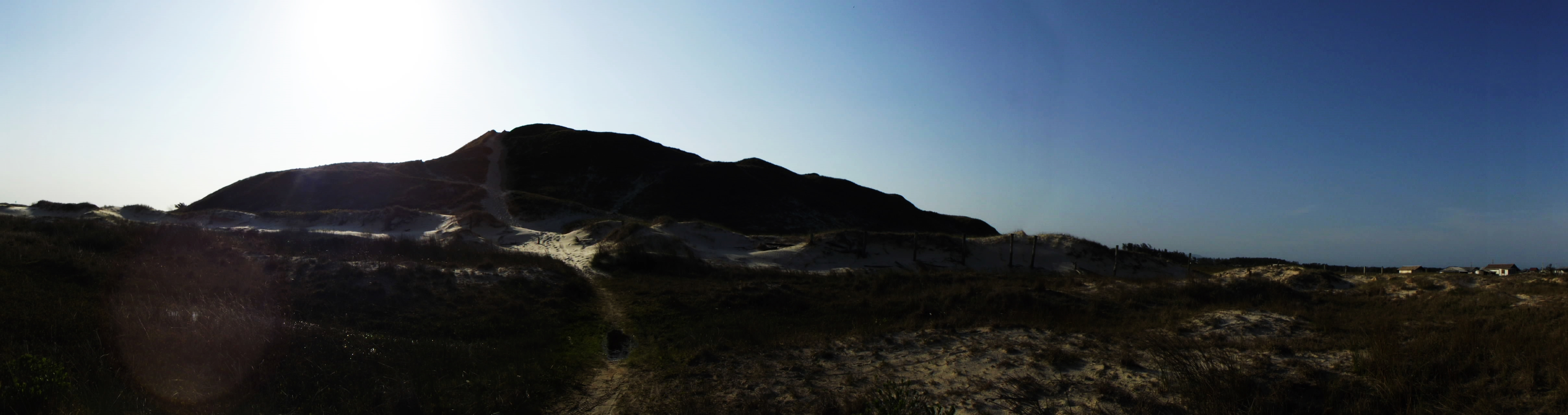 Sítio Arqueológico de tipo Sambaqui, não pertence a Ilha do Campeche mas sim ao município de Jaguaruna, SC, o Sambaqui Garopaba do Sul é o maior sambaqui do mundo.